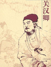 Guan Han Qing